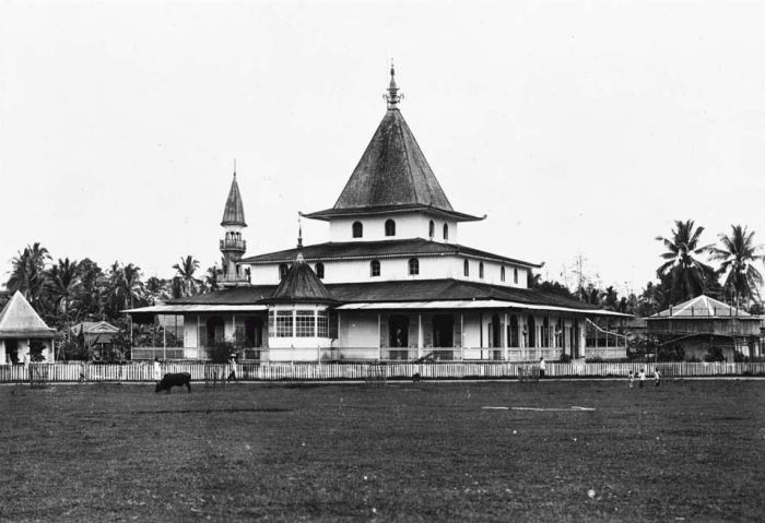 Masjid Martapura di tepi alun-alun